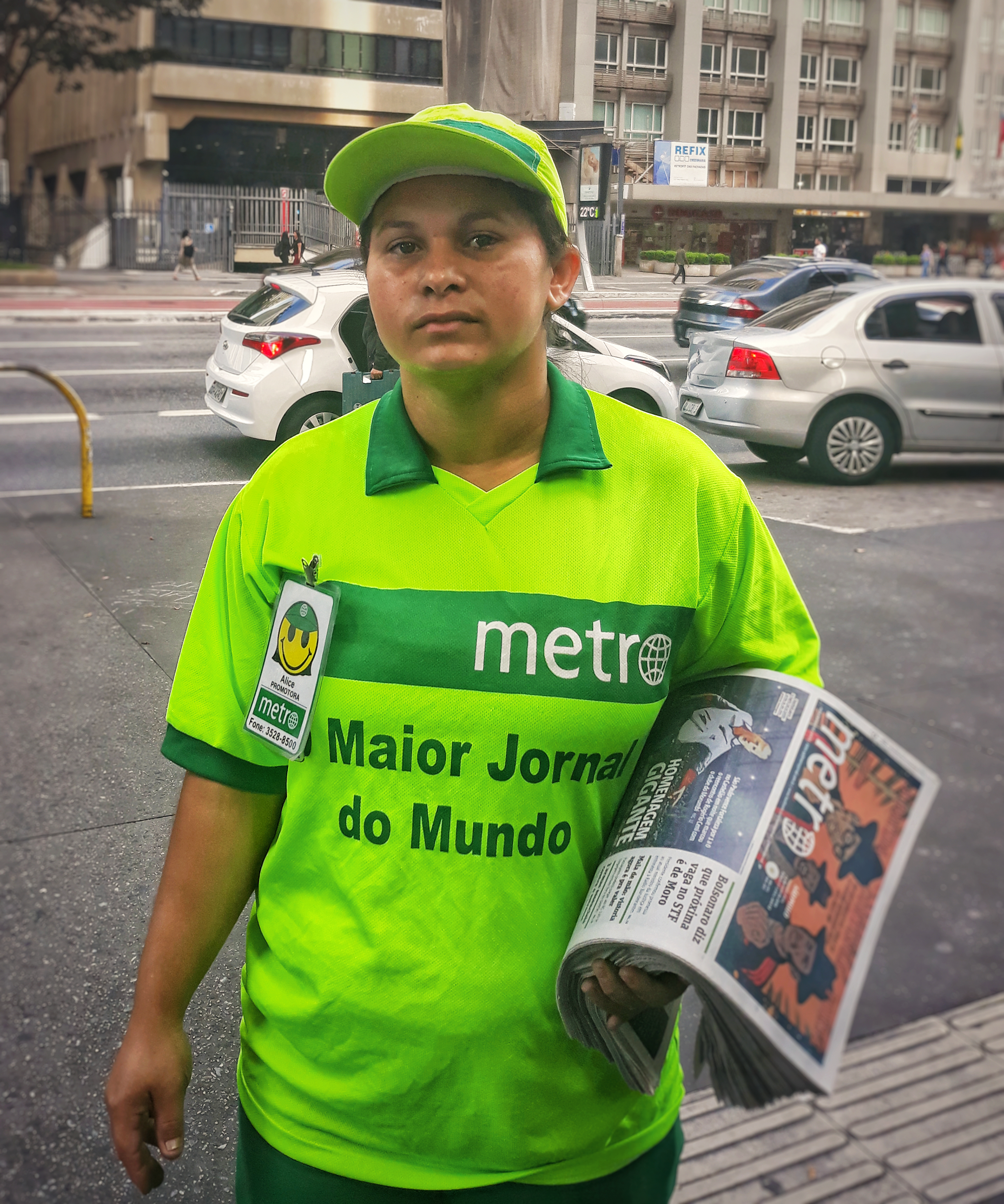 Ana, fotografia realizada no contexto de um projeto educacional na Faculdade Cásper Líbero, em 2019.